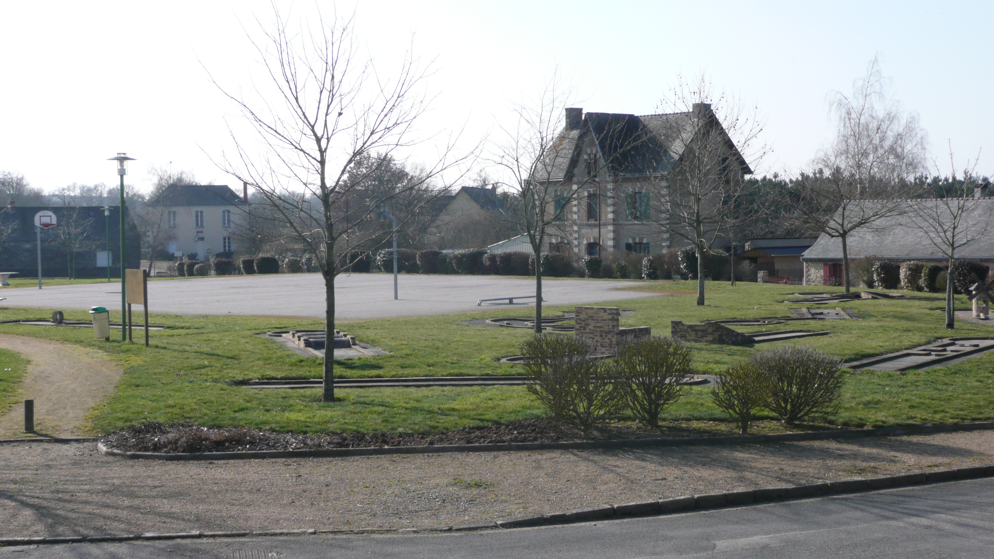 Chapelle Hullin - minigolf et terrain de sport